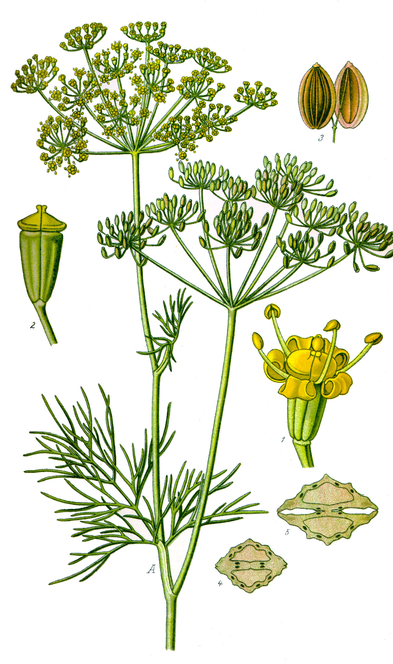 Name Anethum graveolens ;Family:Apiaceae Original book source: Prof. Dr. Otto Wilhelm Thomé Flora von Deutschland, Österreich und der Schweiz 1885, Gera, Germany Permission granted to use under GFDL by Kurt Stueber